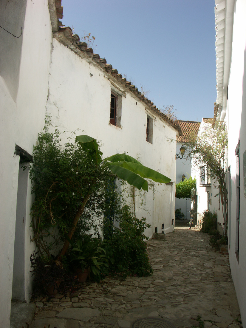 Castellar3(via)